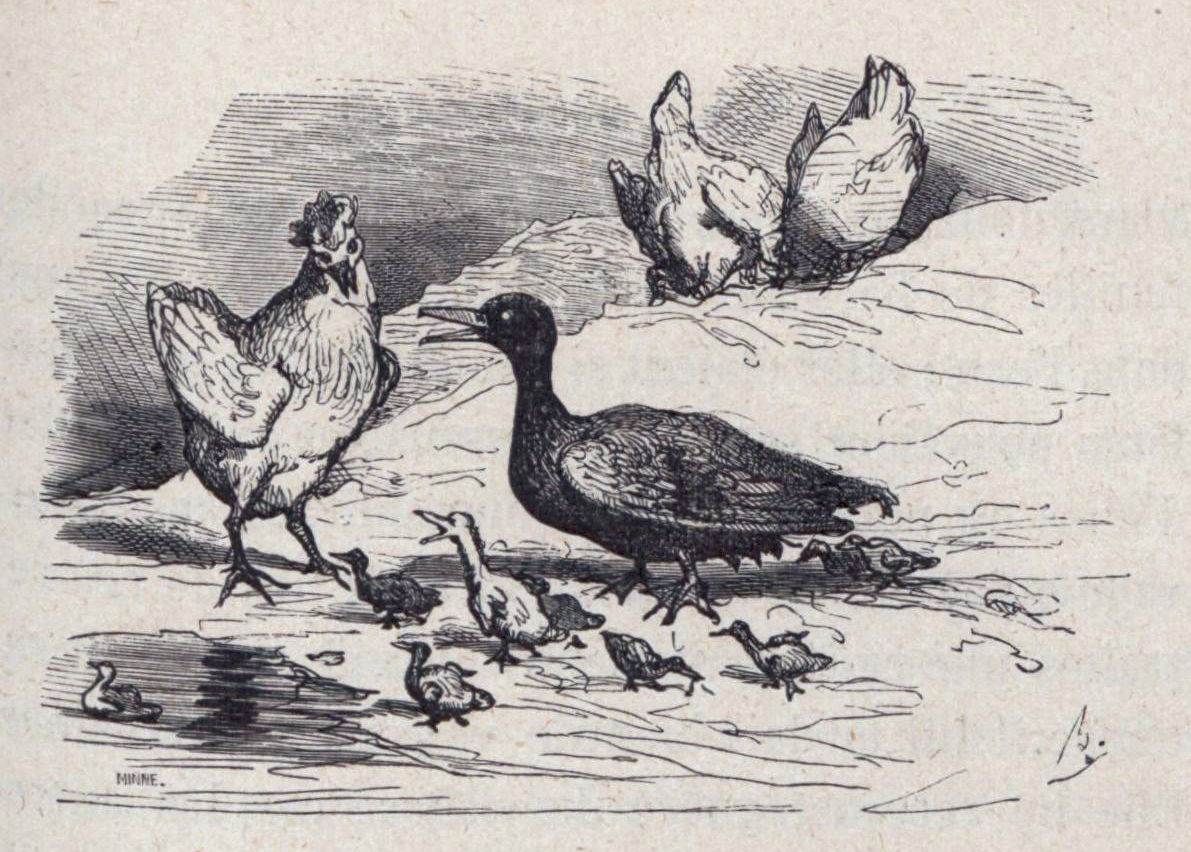 1860s Bertall